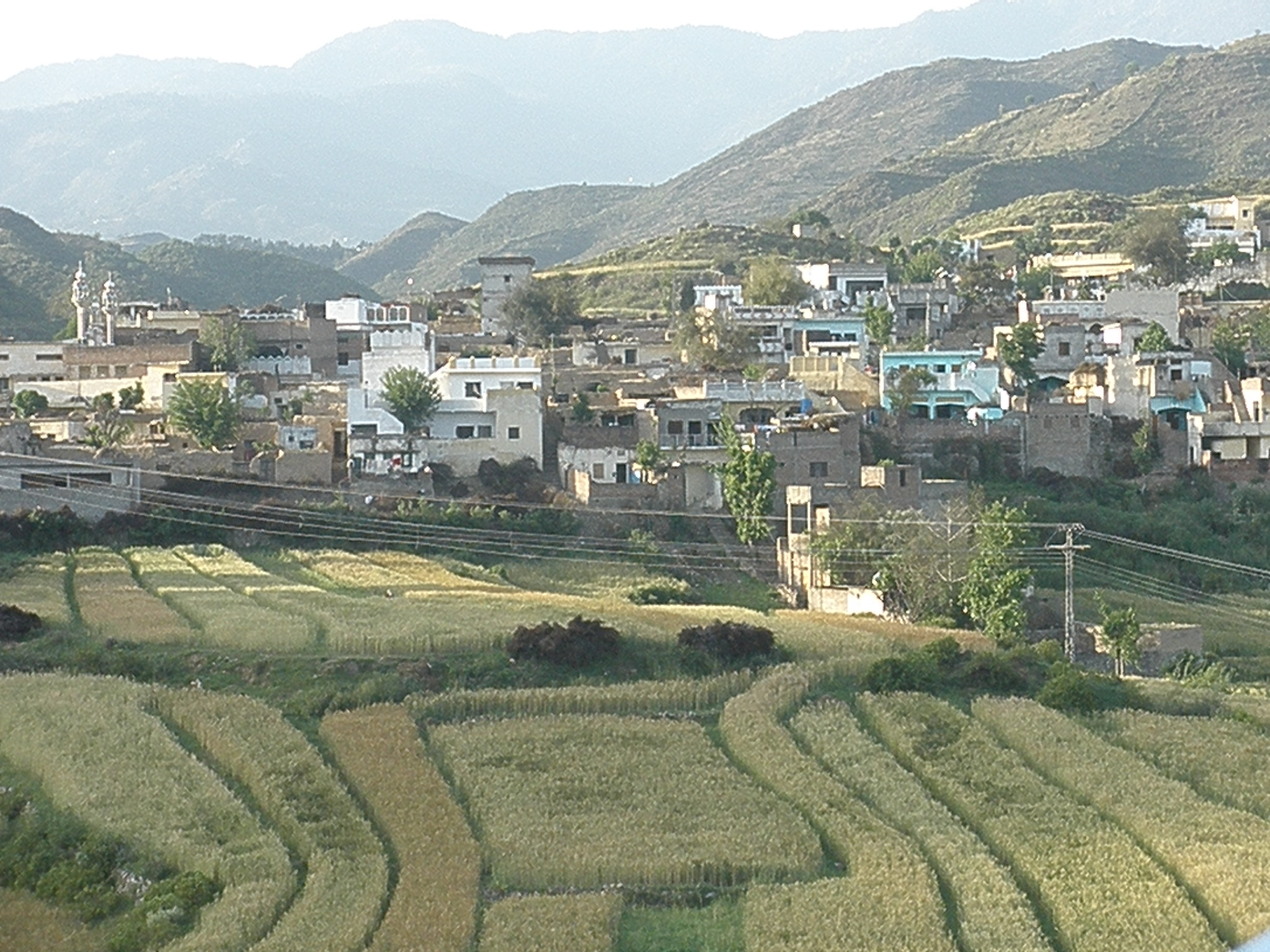 Kabgani